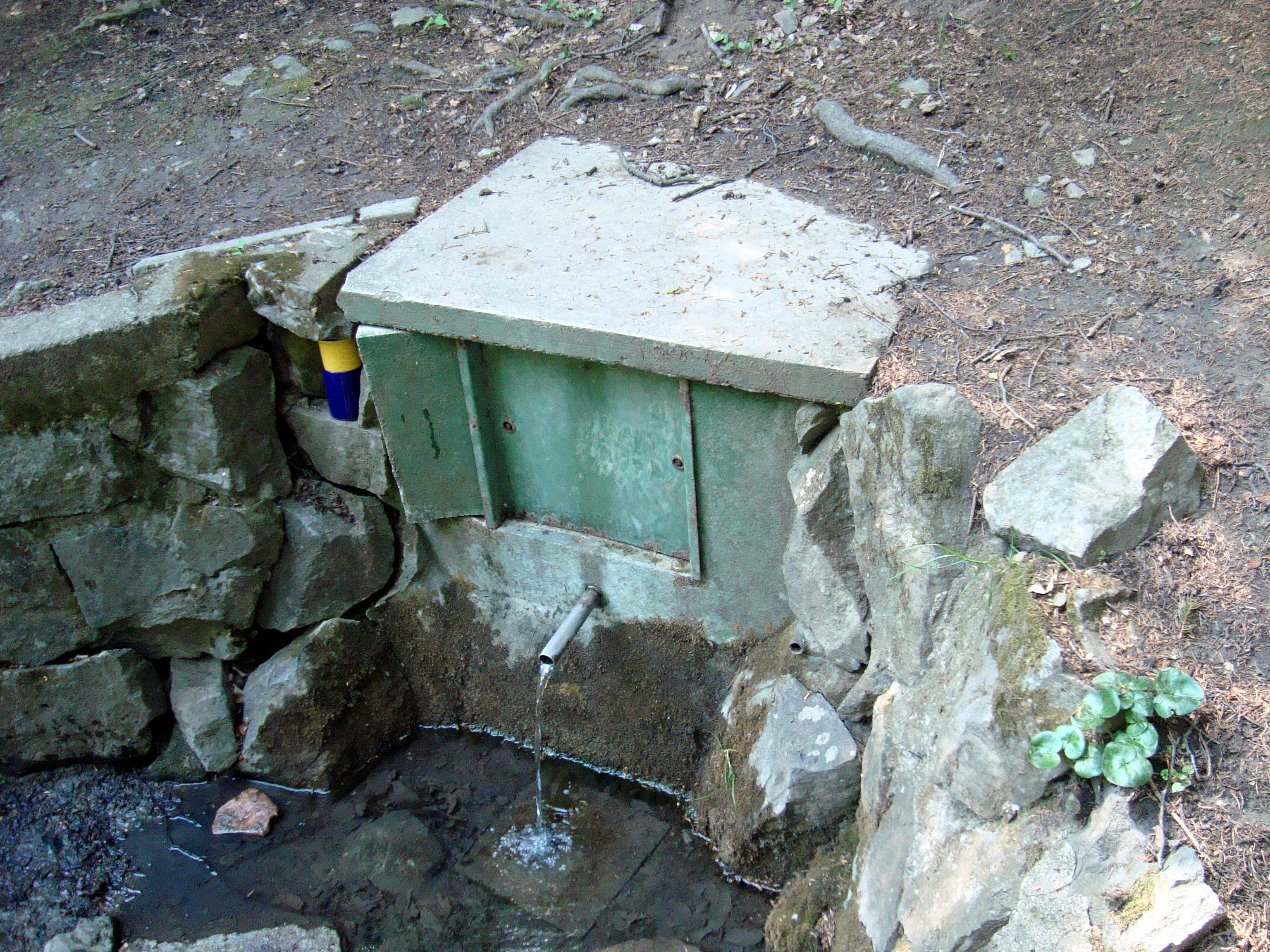 Přírodní park Bobrava, Svatoplukova studánka